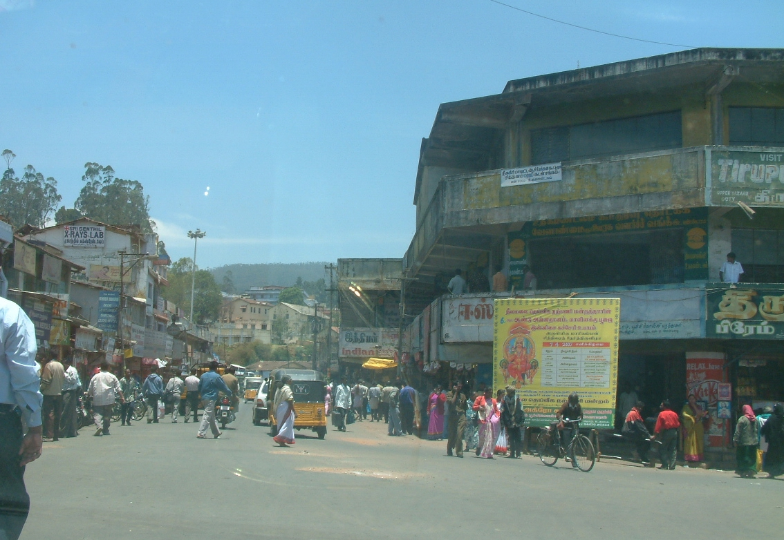 ചള്ളിയാൻ എടുത്തത്